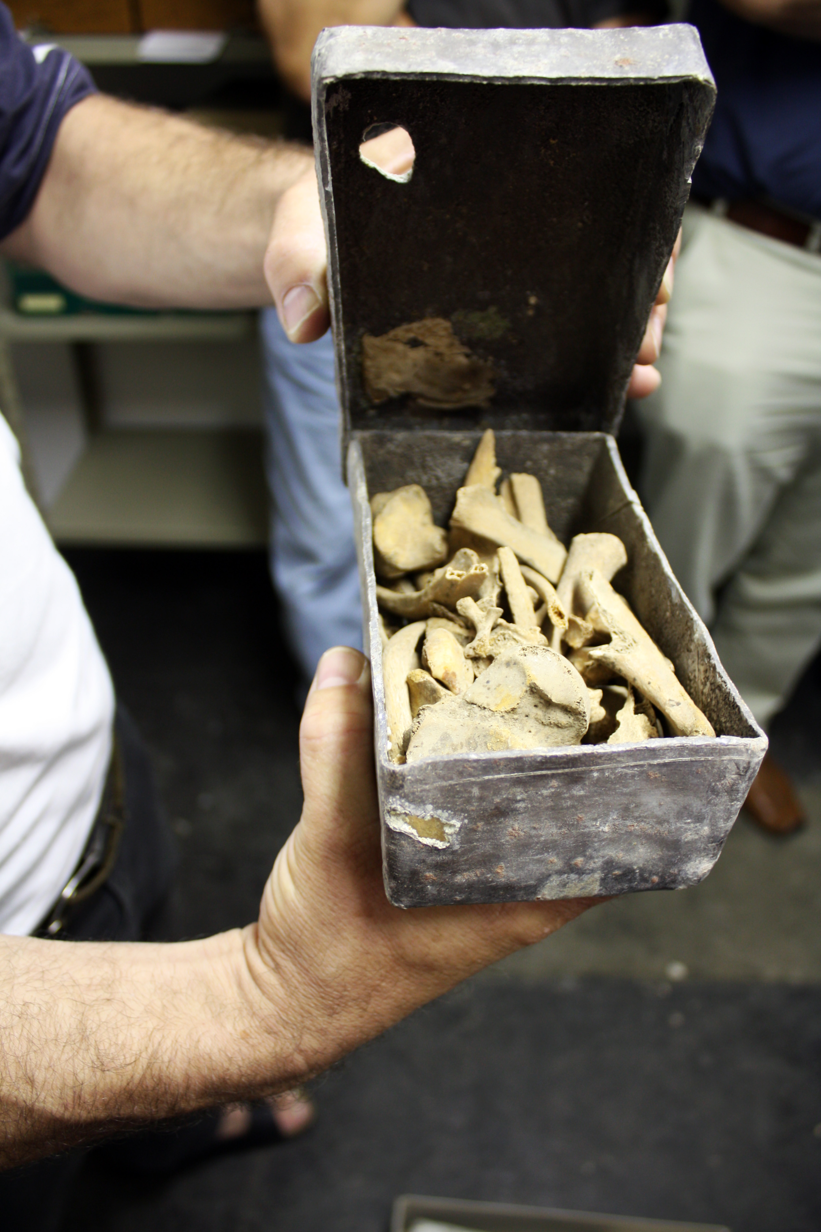 Historisches Archiv des Erzbistums Köln, mittelalterliches Bleigefäß mit Gebein (Reliquien) aus der Klosterkirche Groß-St-Martin